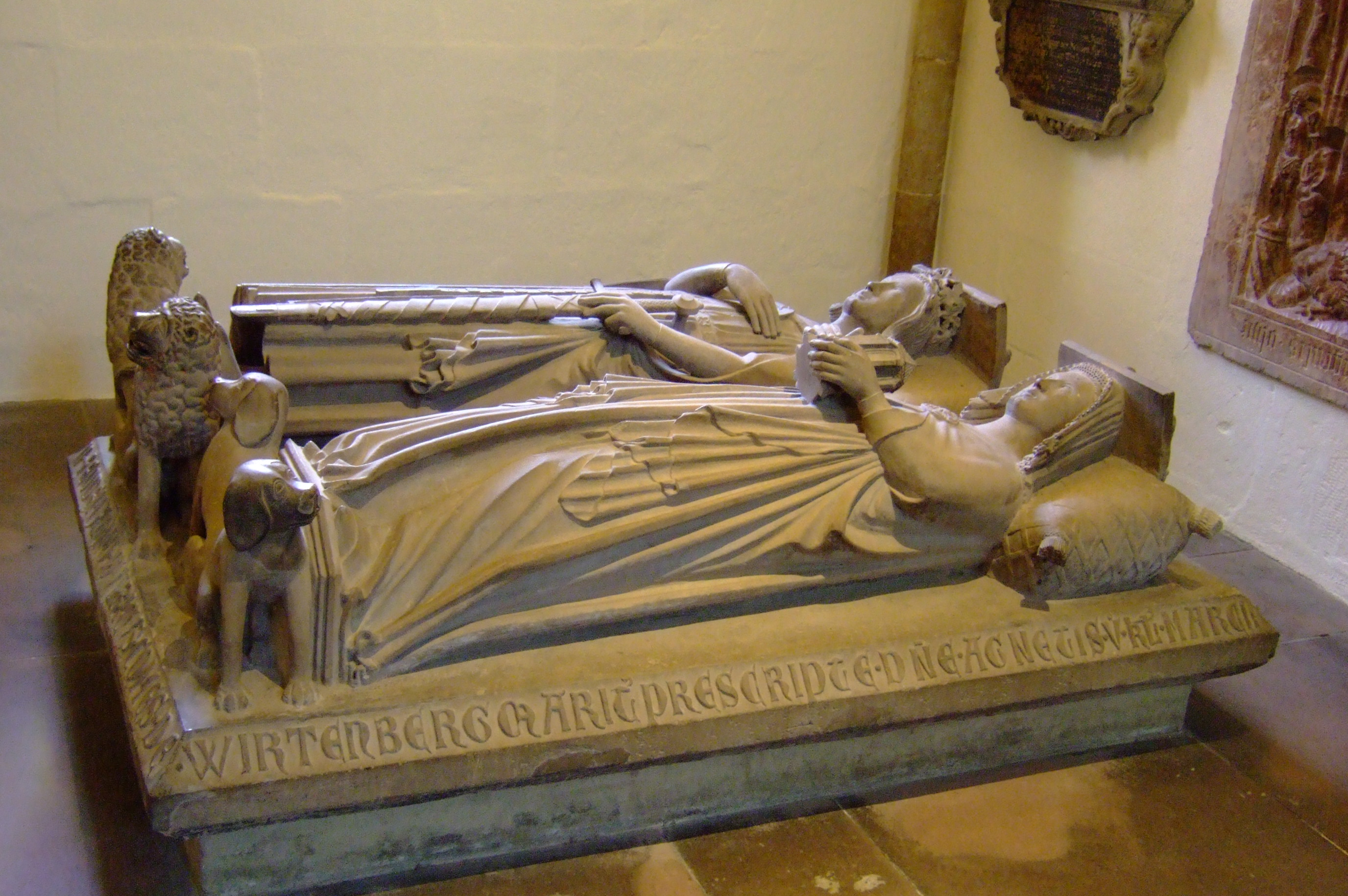 Doppeltumba von Graf Ulrich I. „dem Stifter“ (hinten) und Herzogin Agnes von Liegnitz (vorn), entstanden Ende des 13. Jahrhunderts, Stiftskirche Stuttgart, Deutschland